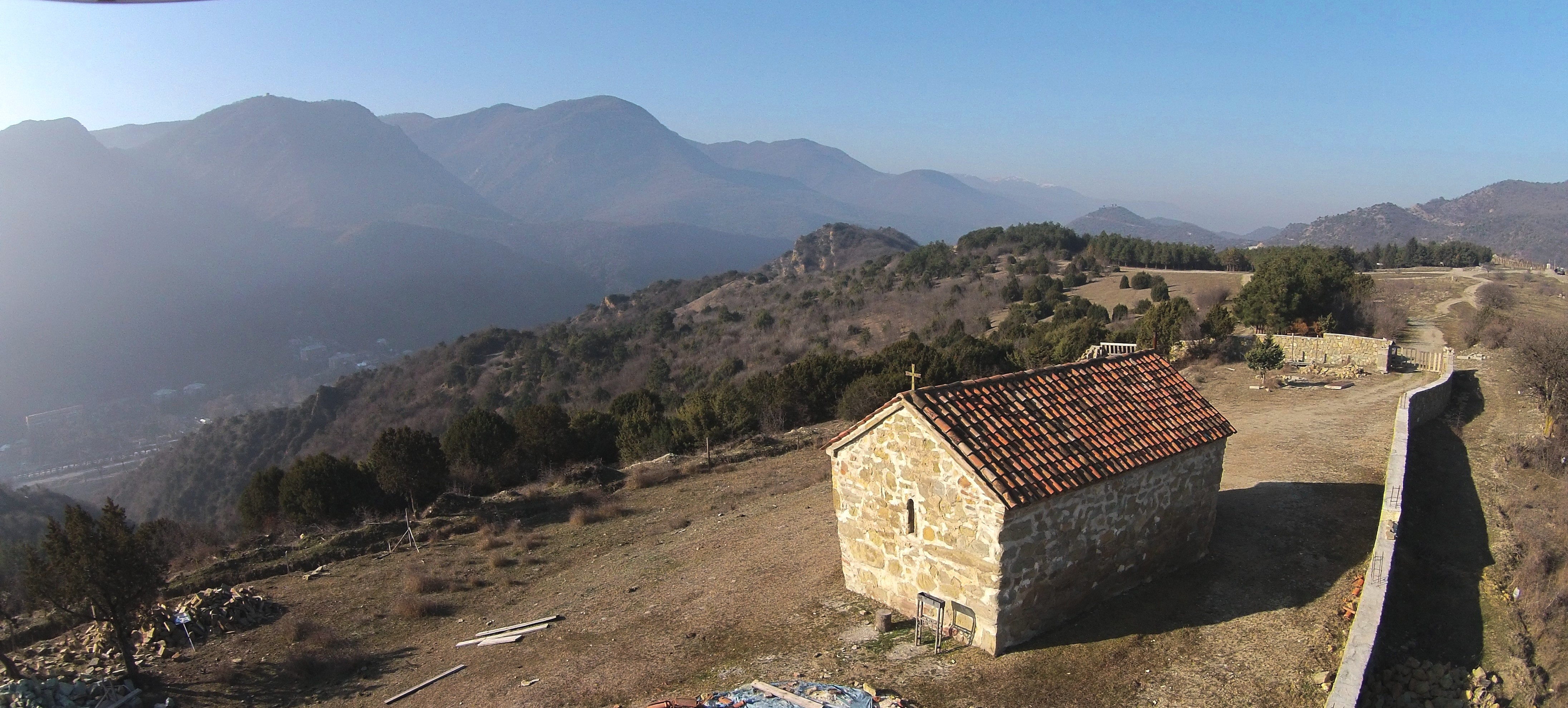 მცხეთის წმინდა დემეტრე თესალონიკელის ეკლესია